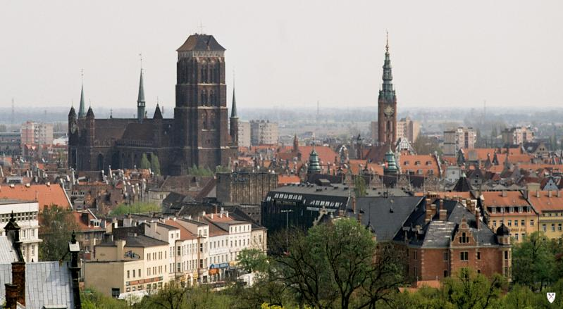 Widok z Grodziska na Główne Miasto. 4 maja 2004